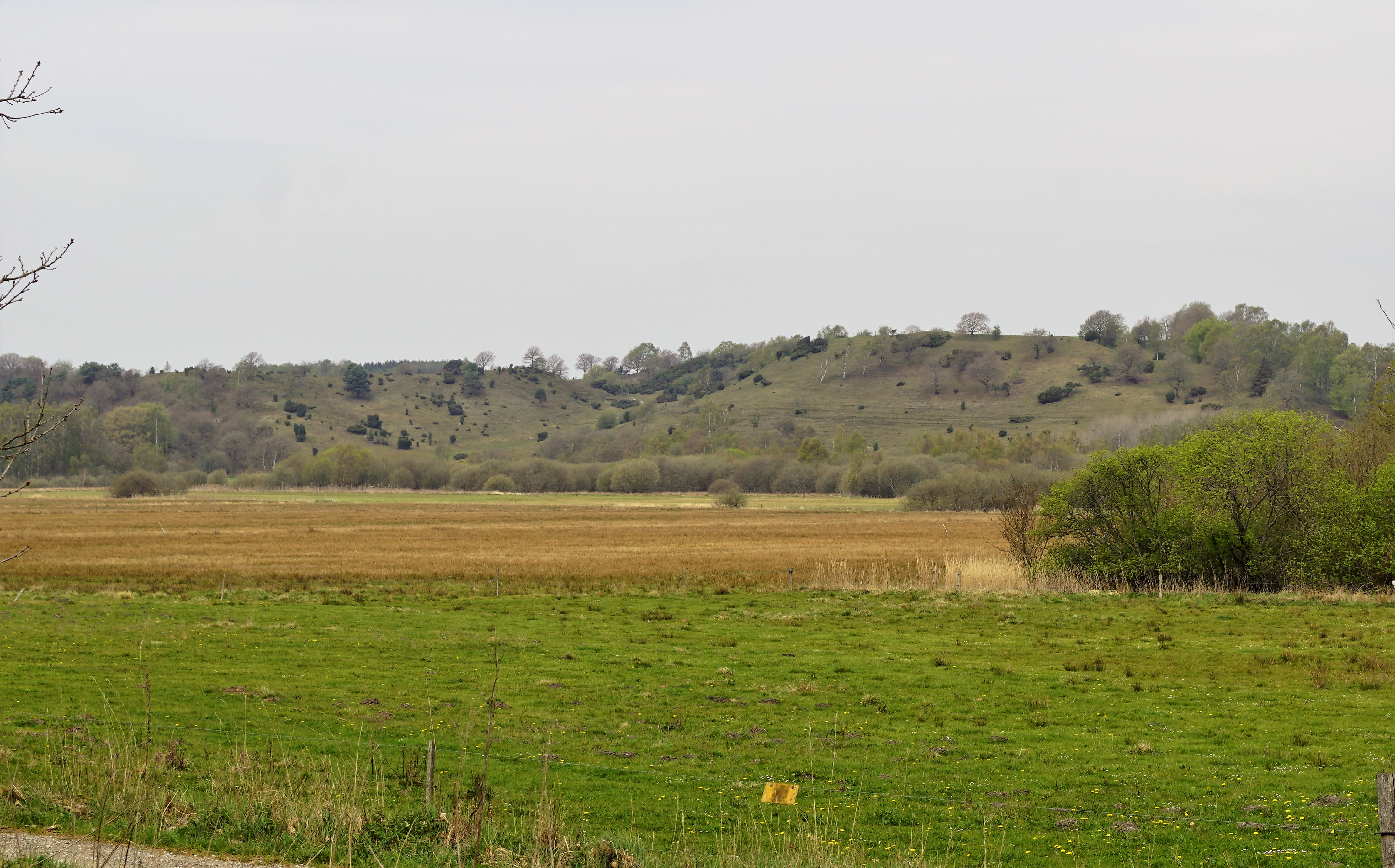 De fredede Læsten Bakker vest for Randers